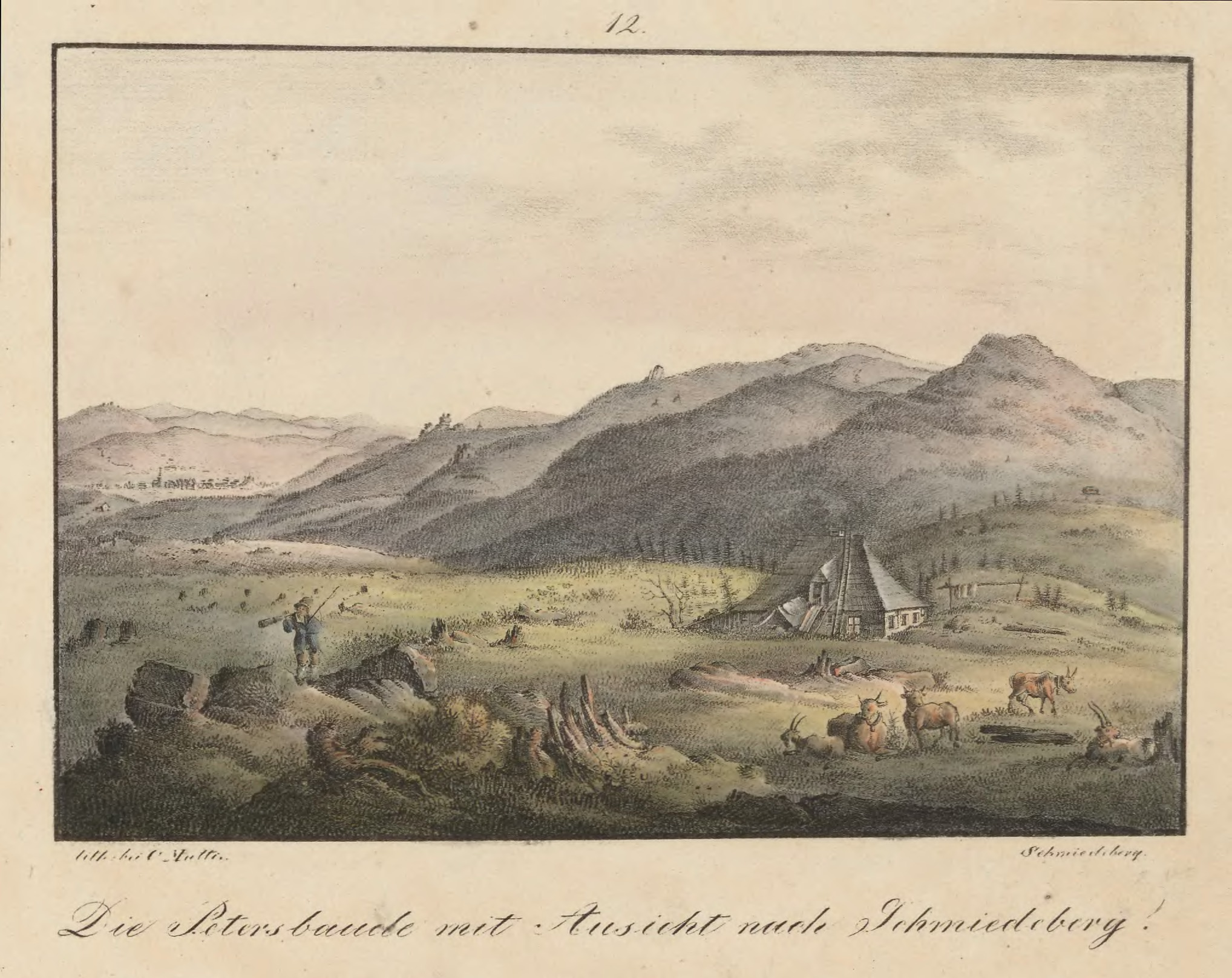 Die Petersbaude mit Ausicht nach Schmiedeberg, Schmiedeberg, Carl Theodor Mattis, 110 x 156 mm